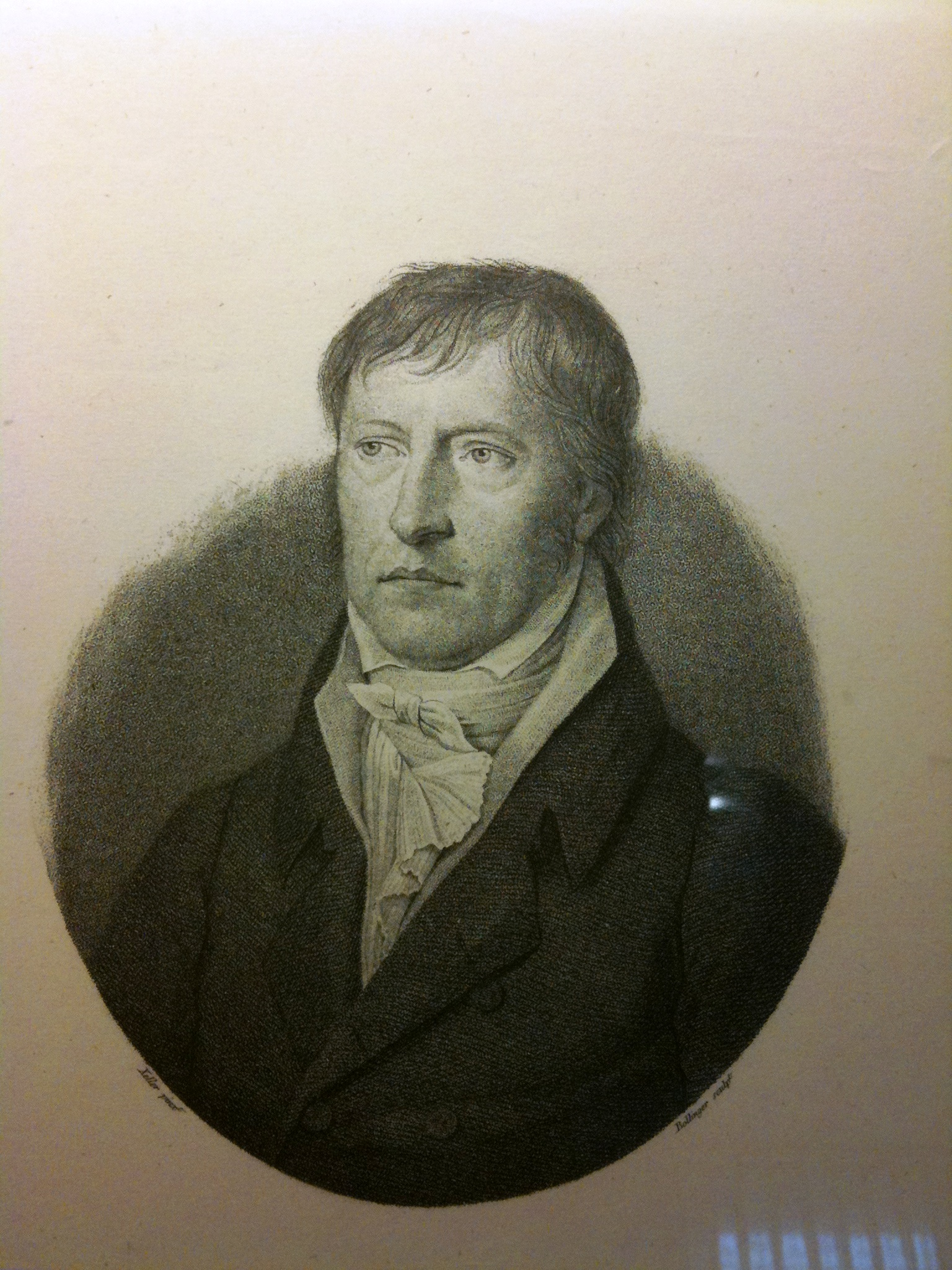 Hegelmuseum Stuttgart: Hegel. Stich von F. W. Bollinger nach Chr. Xeller; das Blatt erschien 1819, die von Xeller gemalte Vorlage muß während Hegels Heidelberger Zeit entstanden sein.